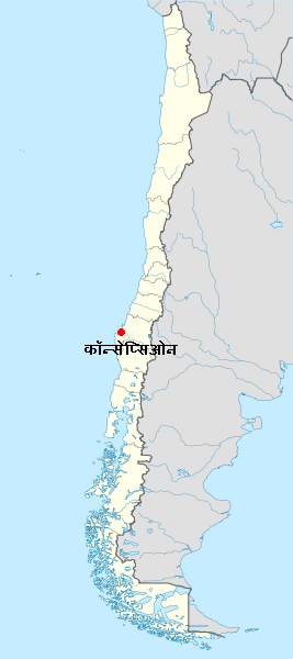 कॉन्सेप्सिओन